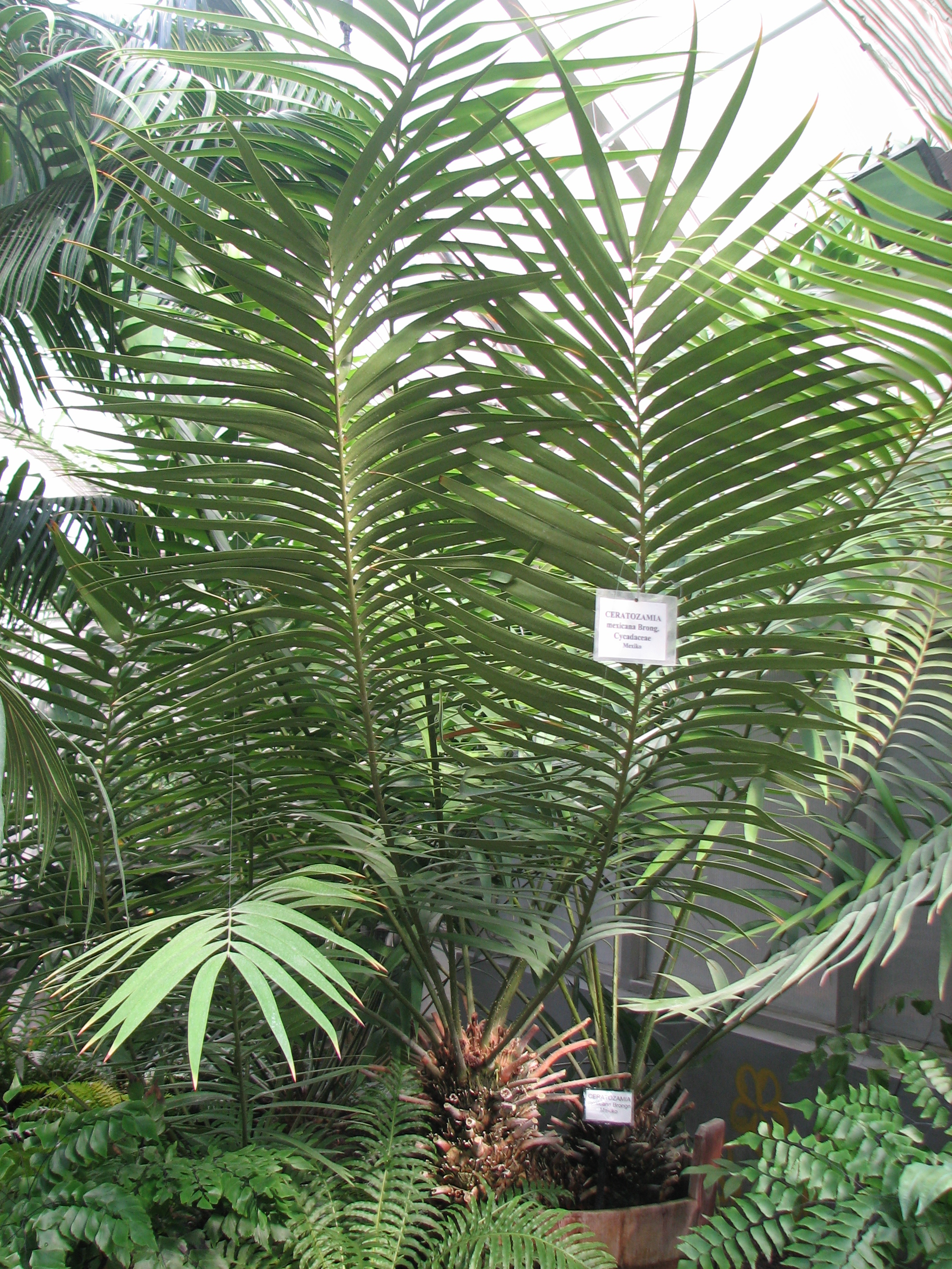 Ceratozamia mexicana Brongn (Botanická zahrada PřF MU)